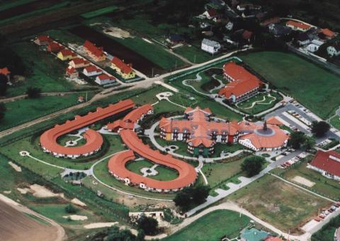 Gyömrő, Hungary, aerialphotography.- Öreghegyi utca - Farkasdi út. Nyugdíjas lakópark uszodával, állatkerttel.